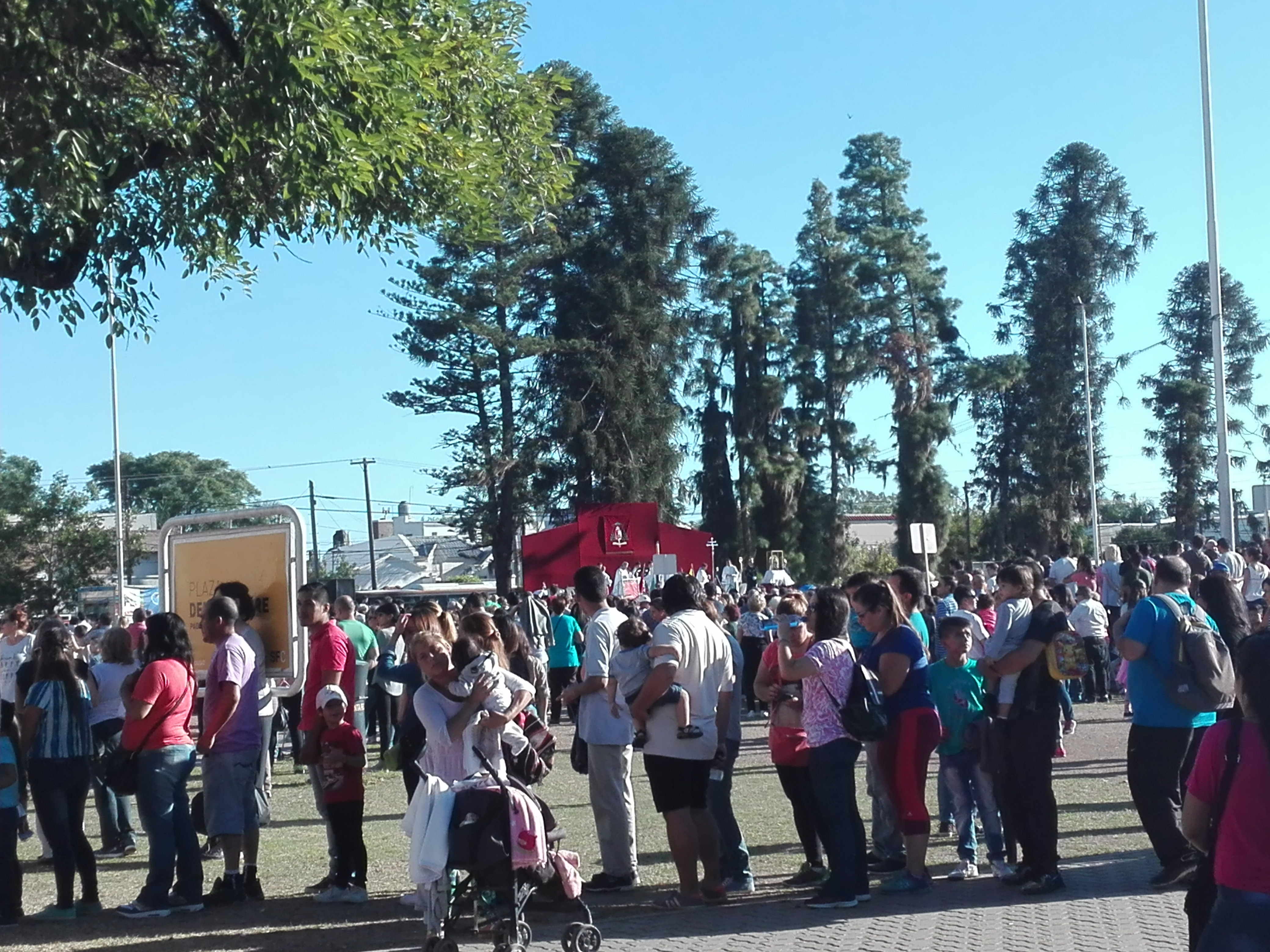 Misa central, en la plaza, en la 119ª Fiesta de la Virgen de Guadalupe.